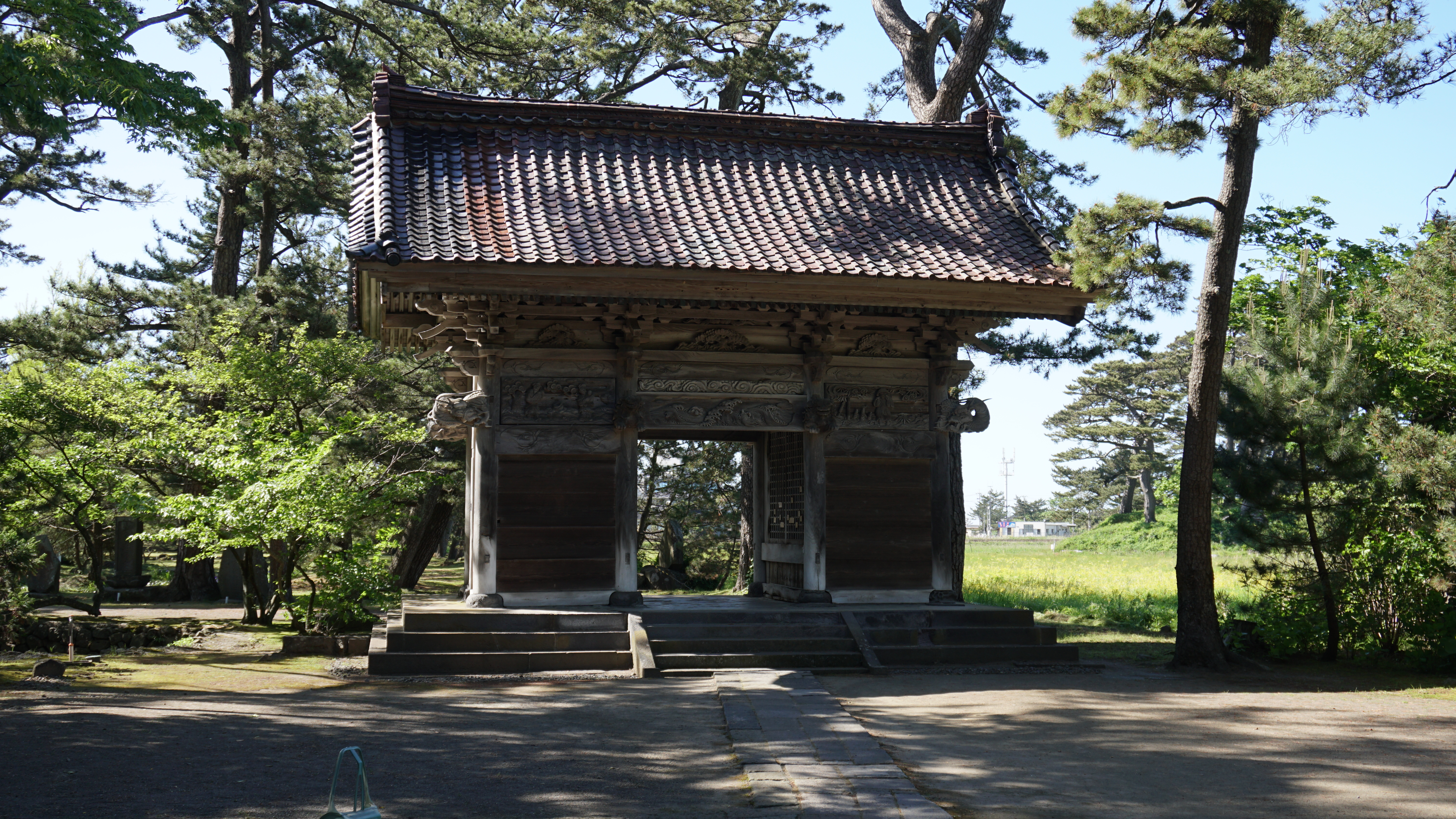 蚶満寺、山門（秋田県にかほ市、象潟）